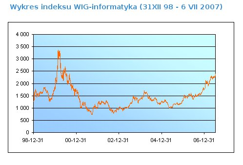 Notowania indeksu WIG Informatyka